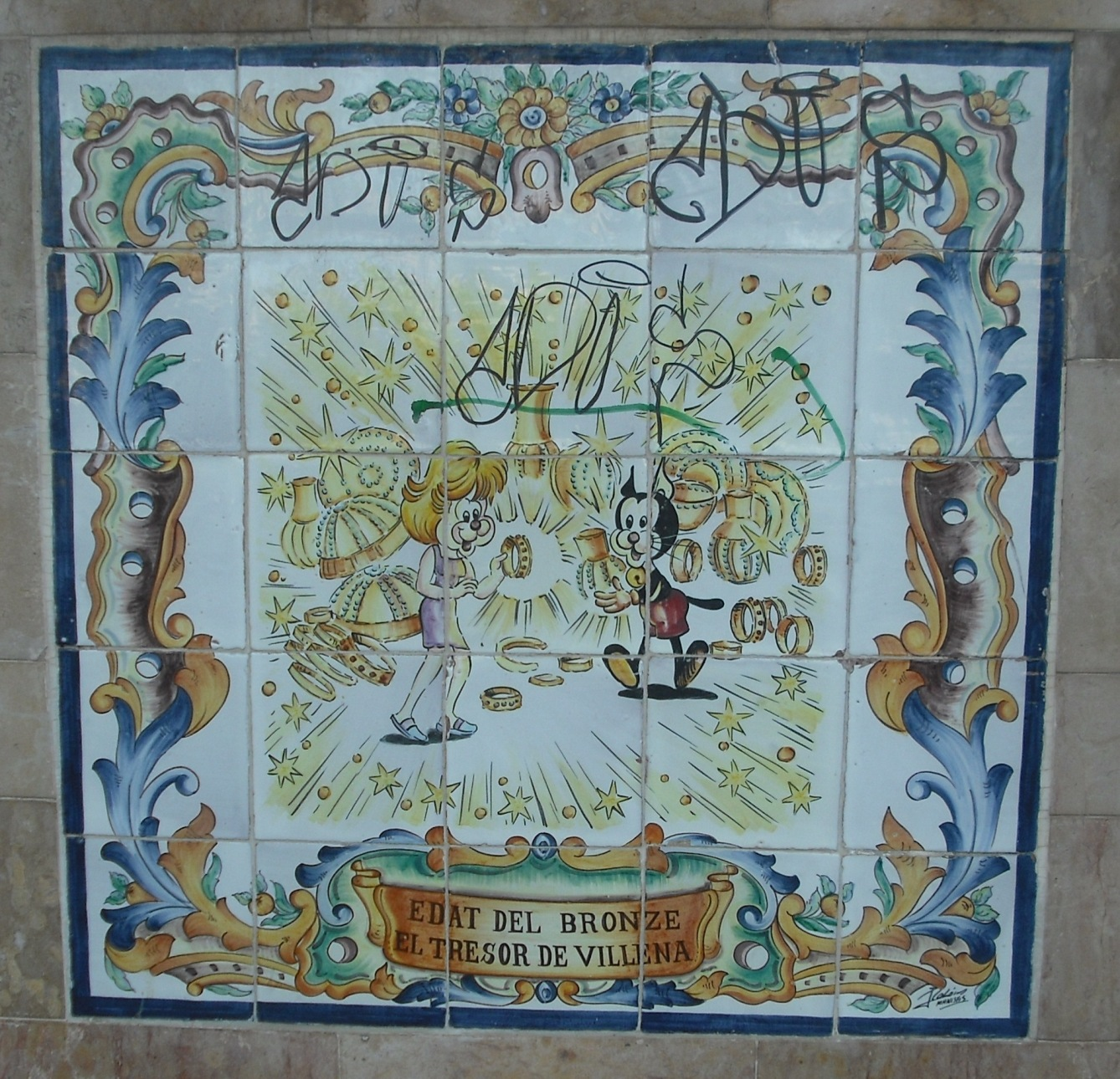 Representació del Tresor de Villena en el Parc Ceràmic d'Història Valenciana de Manises, amb el personatge de Pumby, dibuixat per José Sanchis.